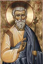 Иосиф Аримафейский Икона Иосифа Аримафейского